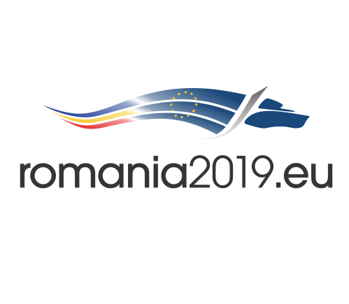 Logo officiel de la présidence roumaine du Conseil de l'UE de 2019.